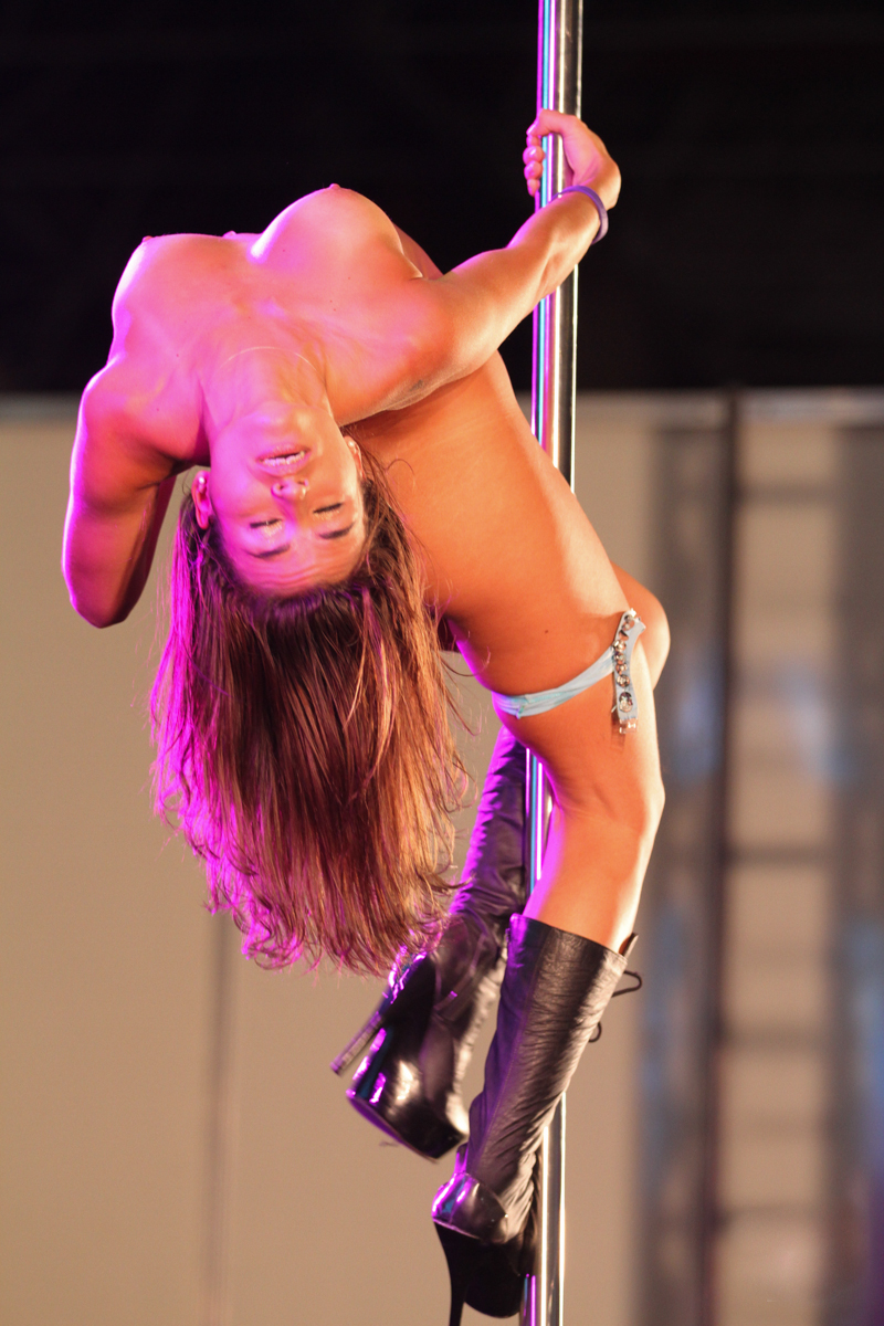 22º Erótika Fair